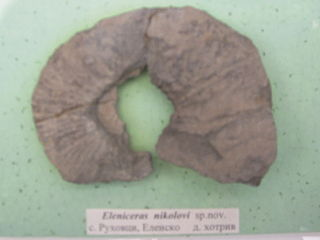 Eleniceras nikolovi. Museum of Paleontology, Sofia University, Bulgaria